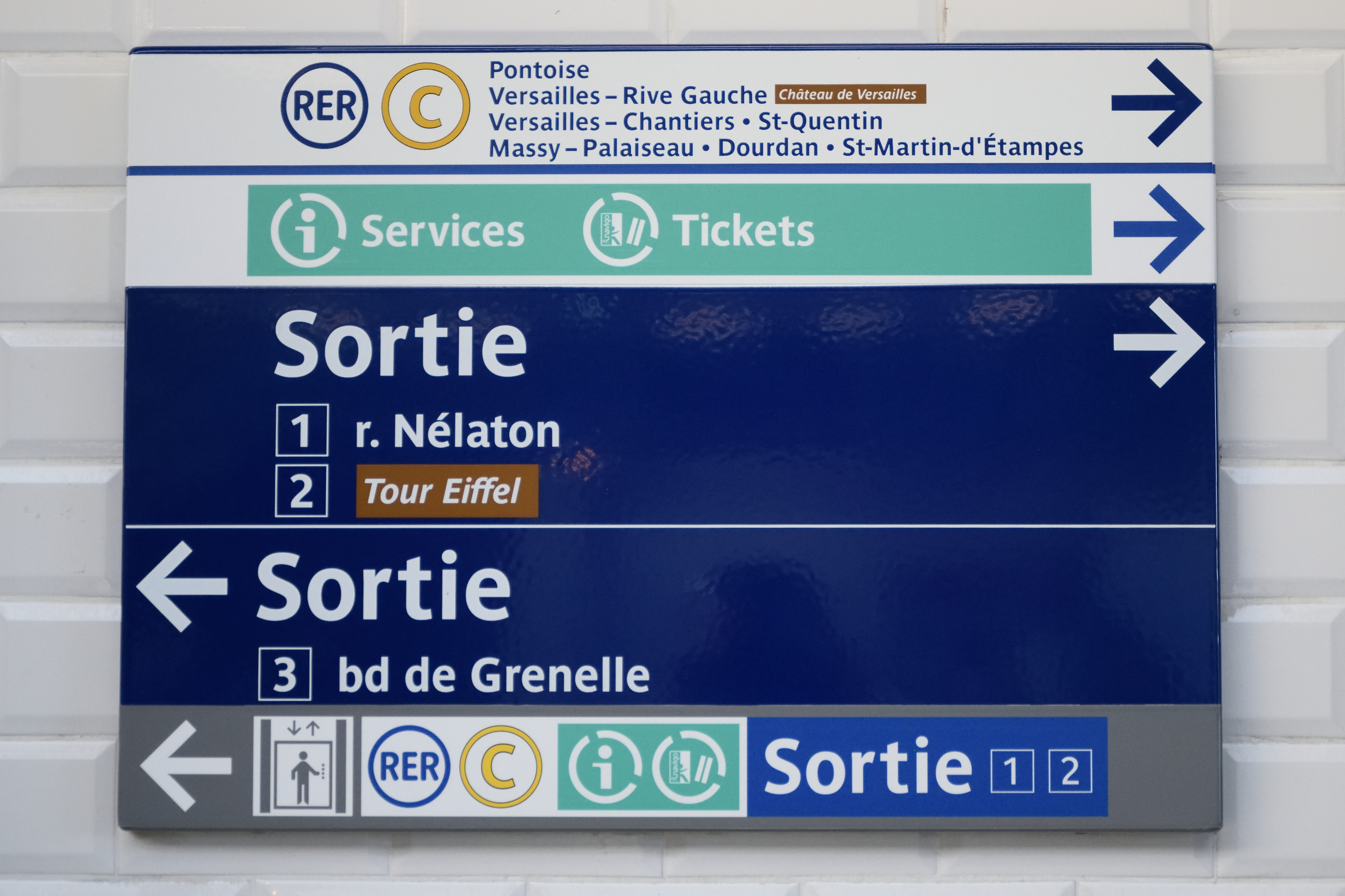 Panneau indicateur des correspondances dans la station de métro Bir-Hakeim, à Paris 15e.